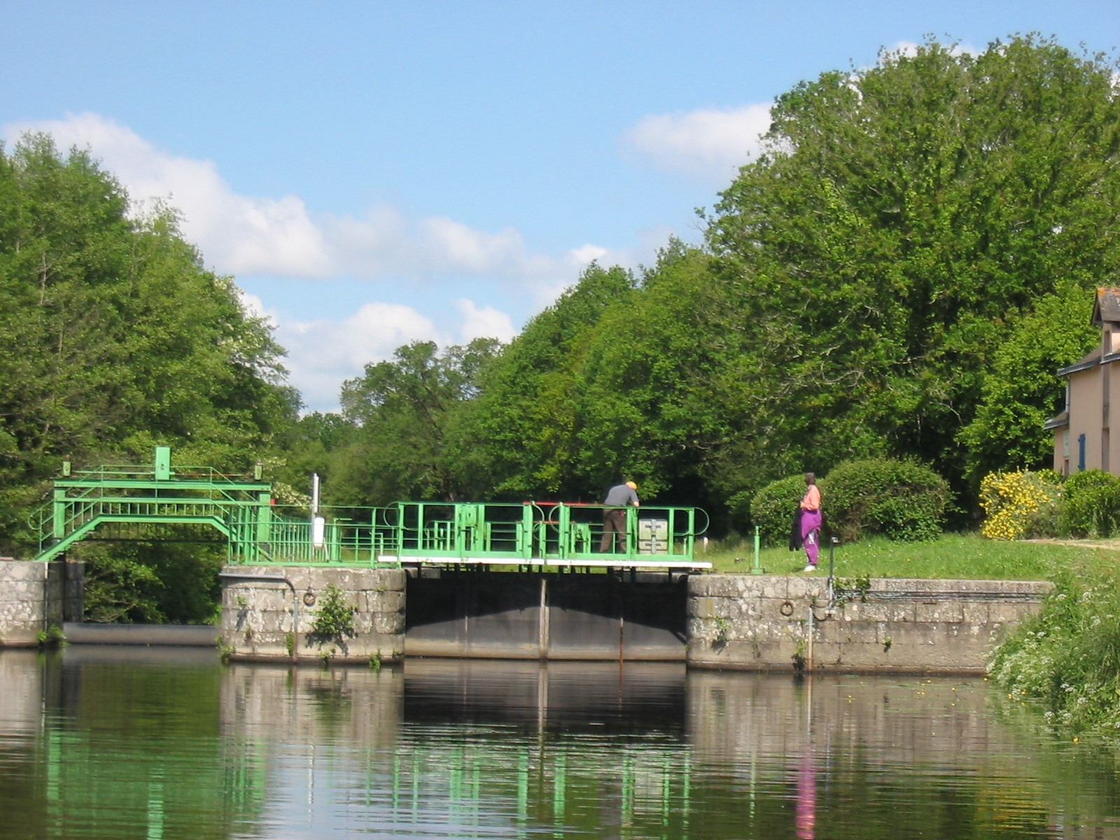 Schleusenanlage am kanalisierten Isac (Canal de Nantes à Brest) zwischen Blain und Guenrouët in Frankreich